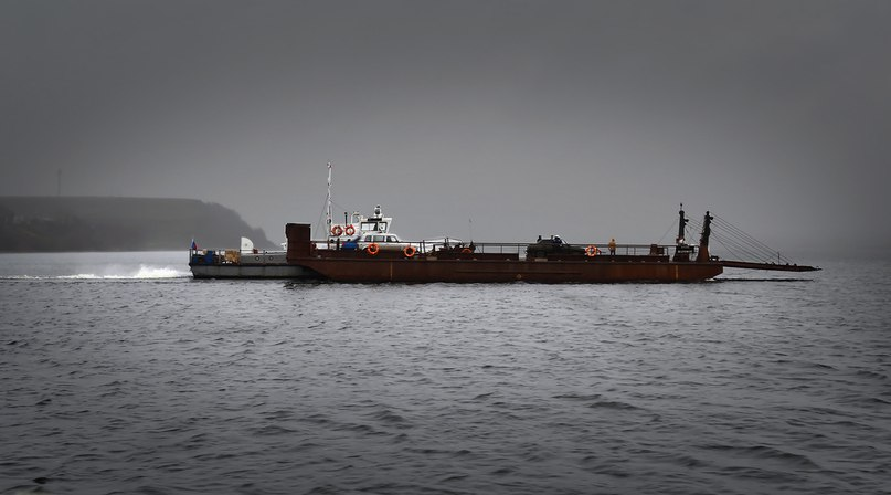 Камбарский паром